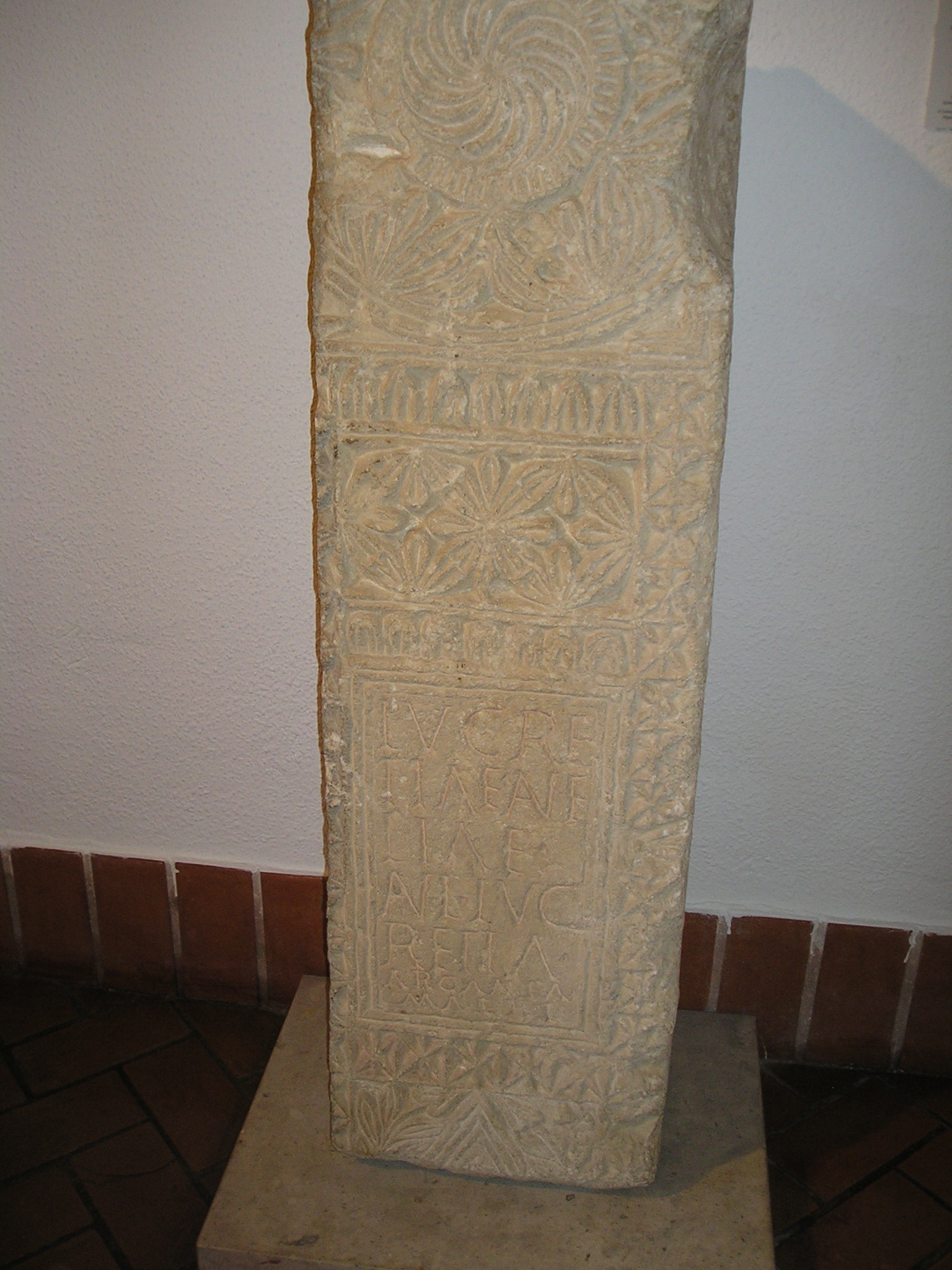 Inscripción funeraria romana procedente de Valdenebro de los Valles (Valladolid), correspondiente con Ivalladolid 22: Lucre/tiae Ane/liae/ an(norum) L Luc/retia/ Arganta/ matri